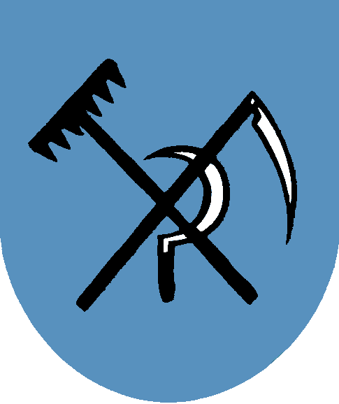 Herb Świętoszówki w powiecie bielskim, gminie Jasienica